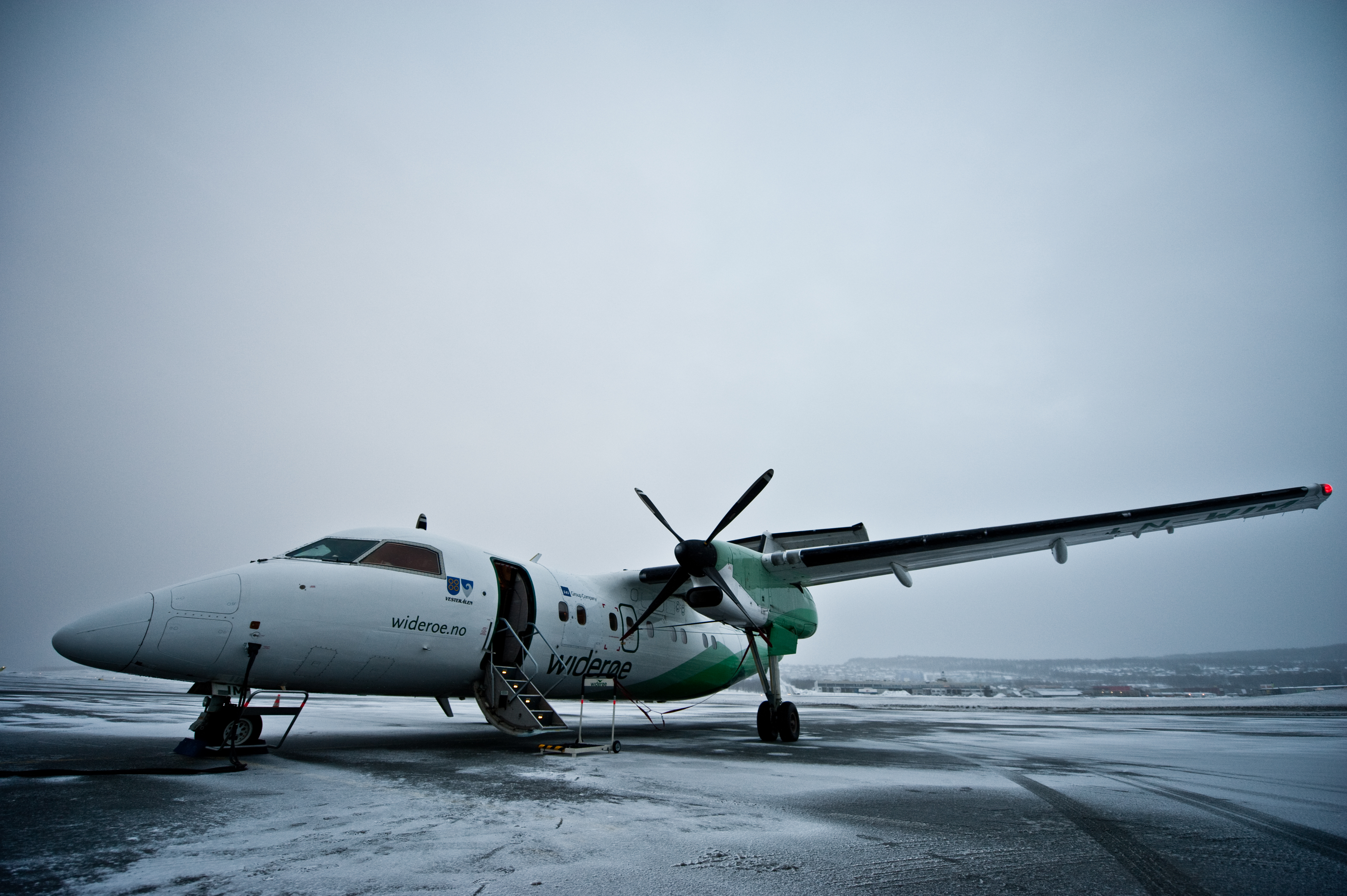 HVBS-elevene (1 of 48)